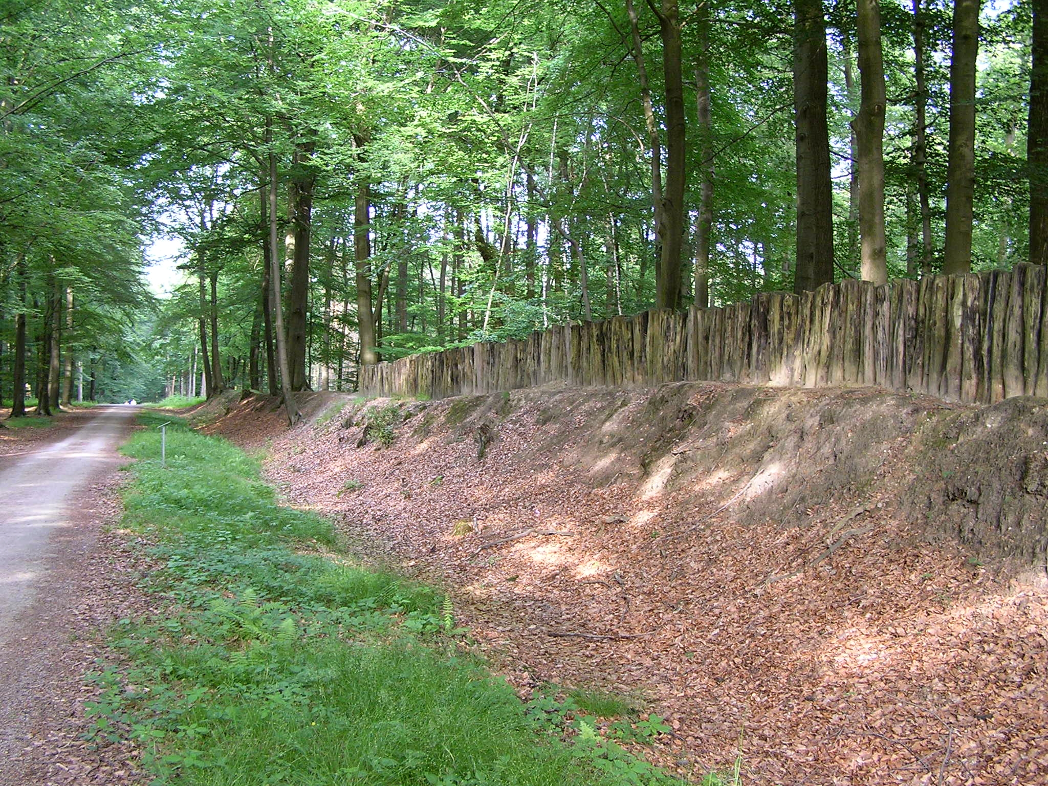 Palisadenwall im Tiergarten Schloss Raesfeld